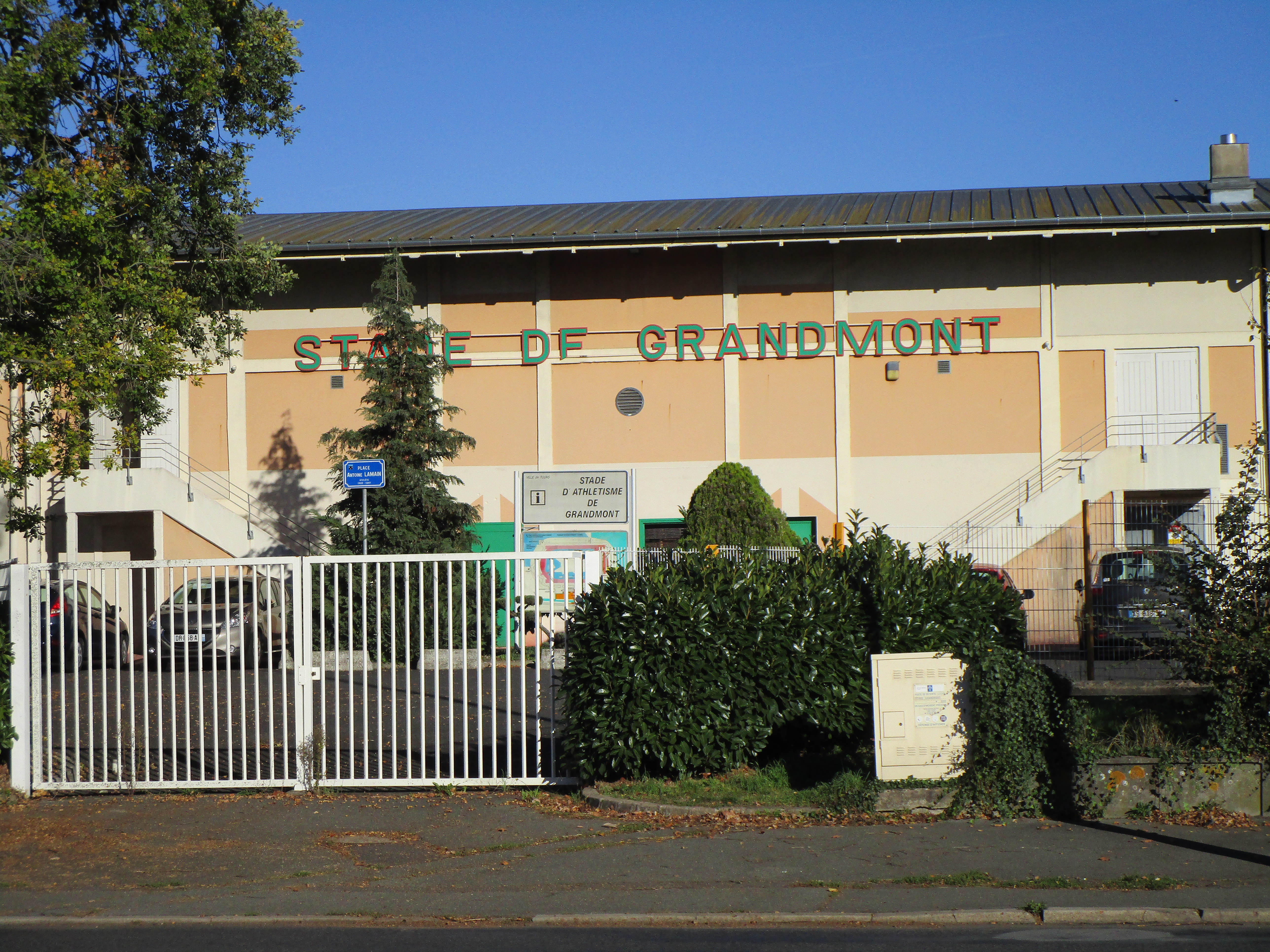 Le stade de Grandmont de Tours, sur l'avenue de l'Alouette, dans le quartier Monjoyeux-Grandmont.